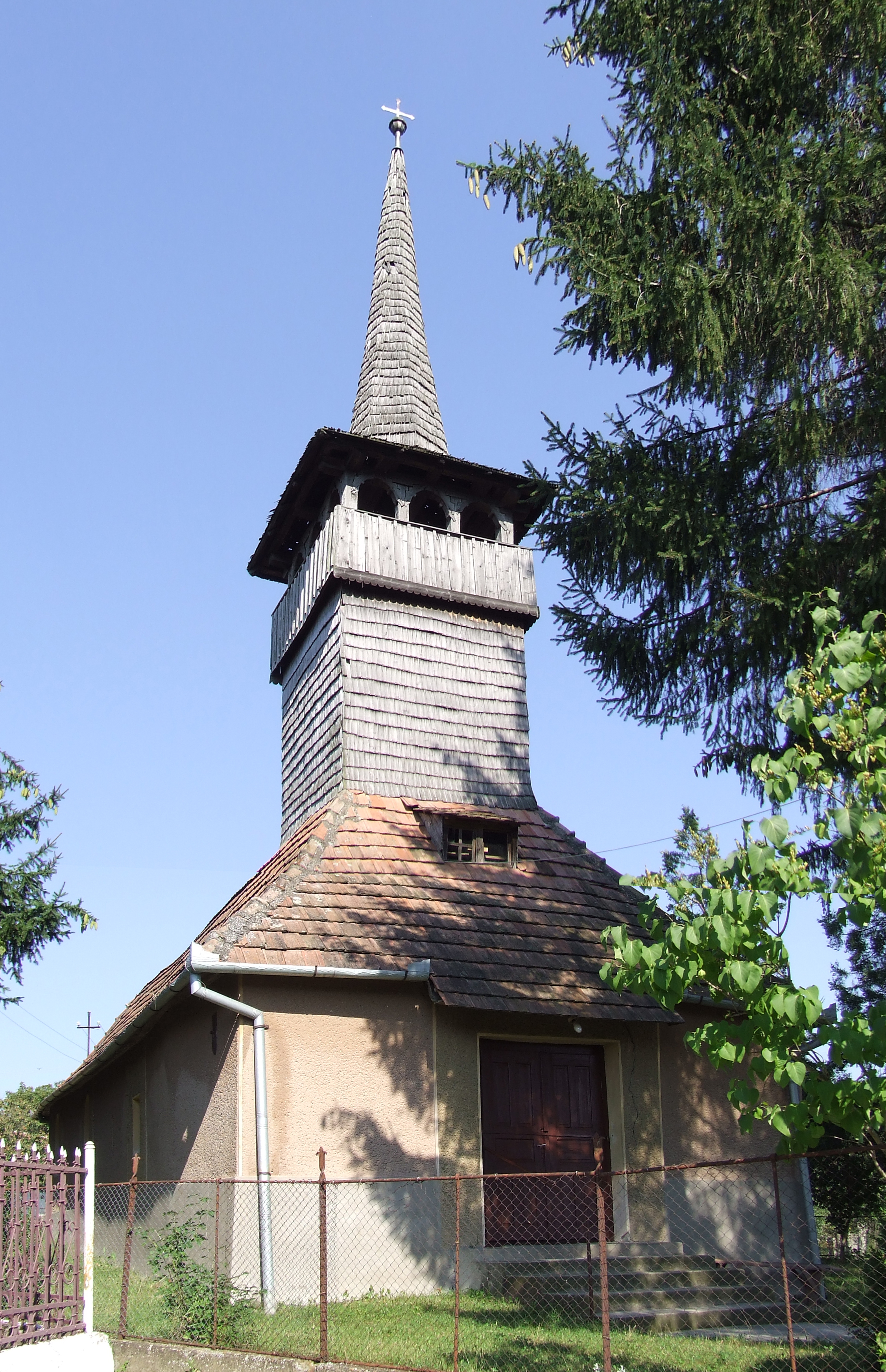 Biserica Sf. Arhangheli din Hurezu Mare, judeţul Satu Mare.